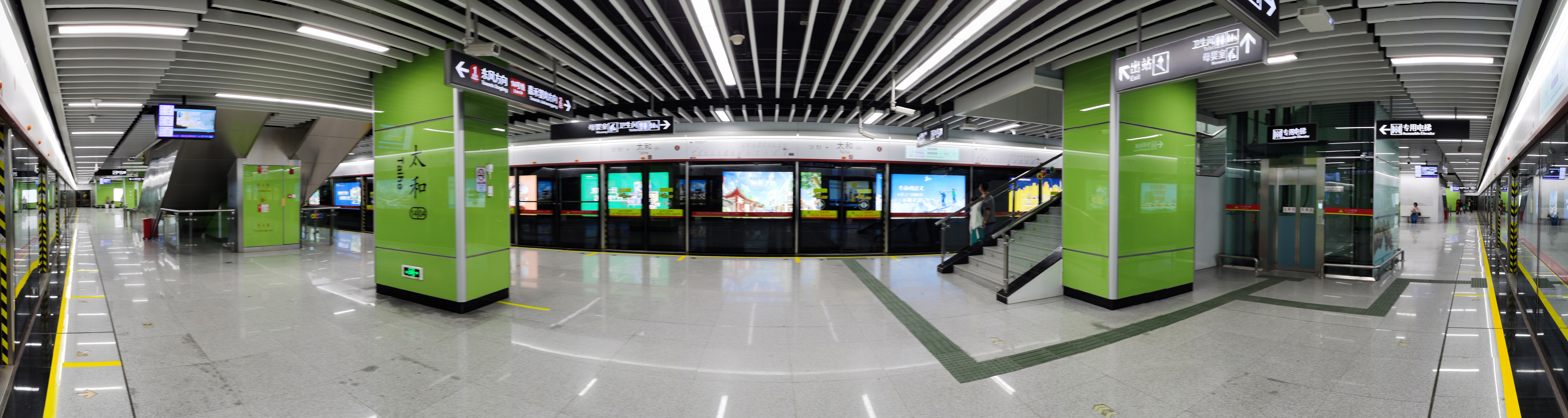 广州地铁太和站